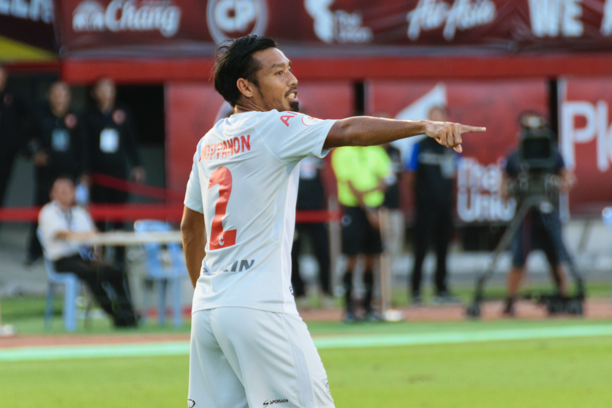 Noppanon Kachaplayuk